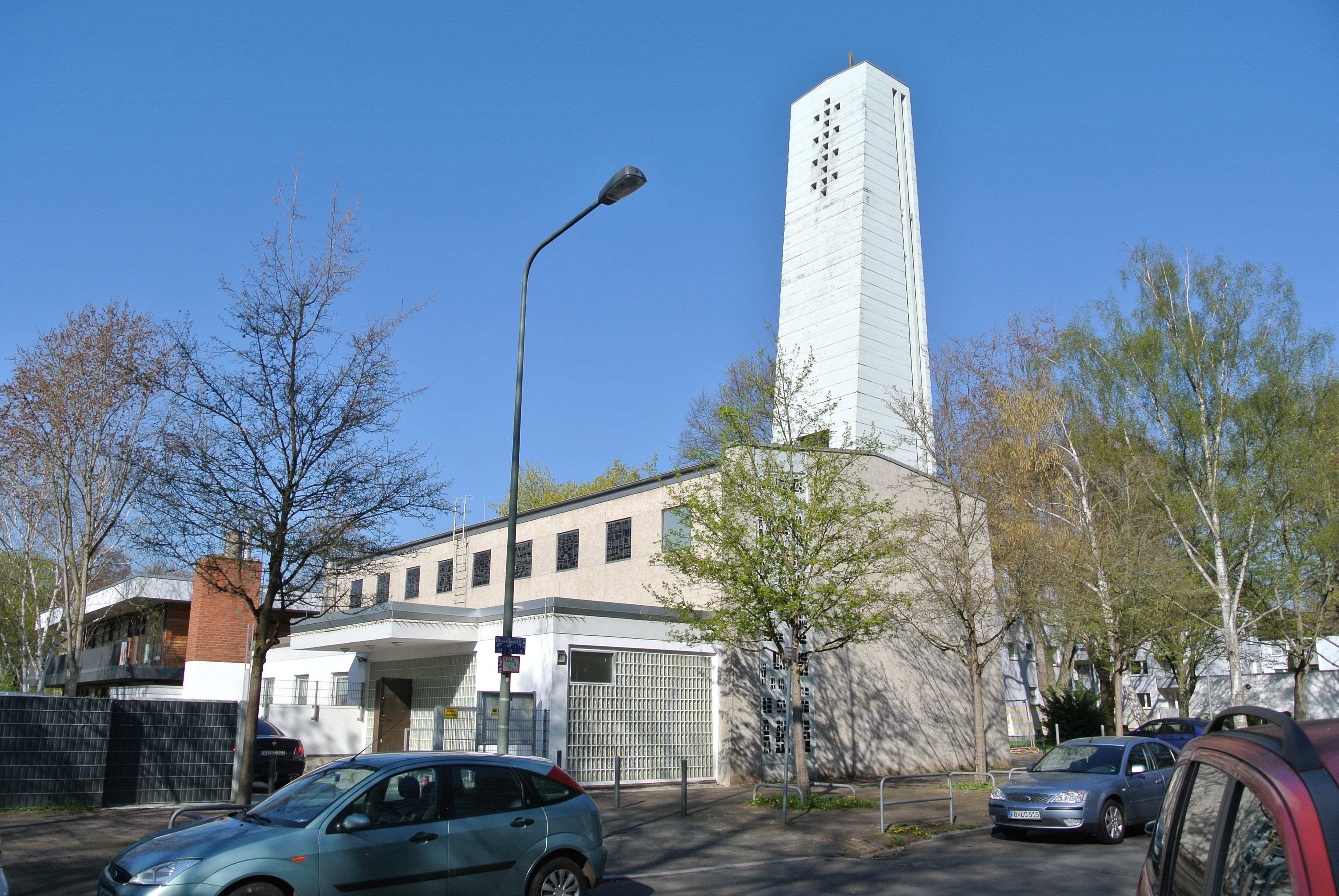 ehemals evangelische Kirchengemeinde Zeilsheim, derzeit von rumänischer Gemeinde genutzt